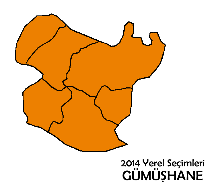 2014 yerel seçimlerinde Gümüşhane ilinin sonuçlarını gösteren harita